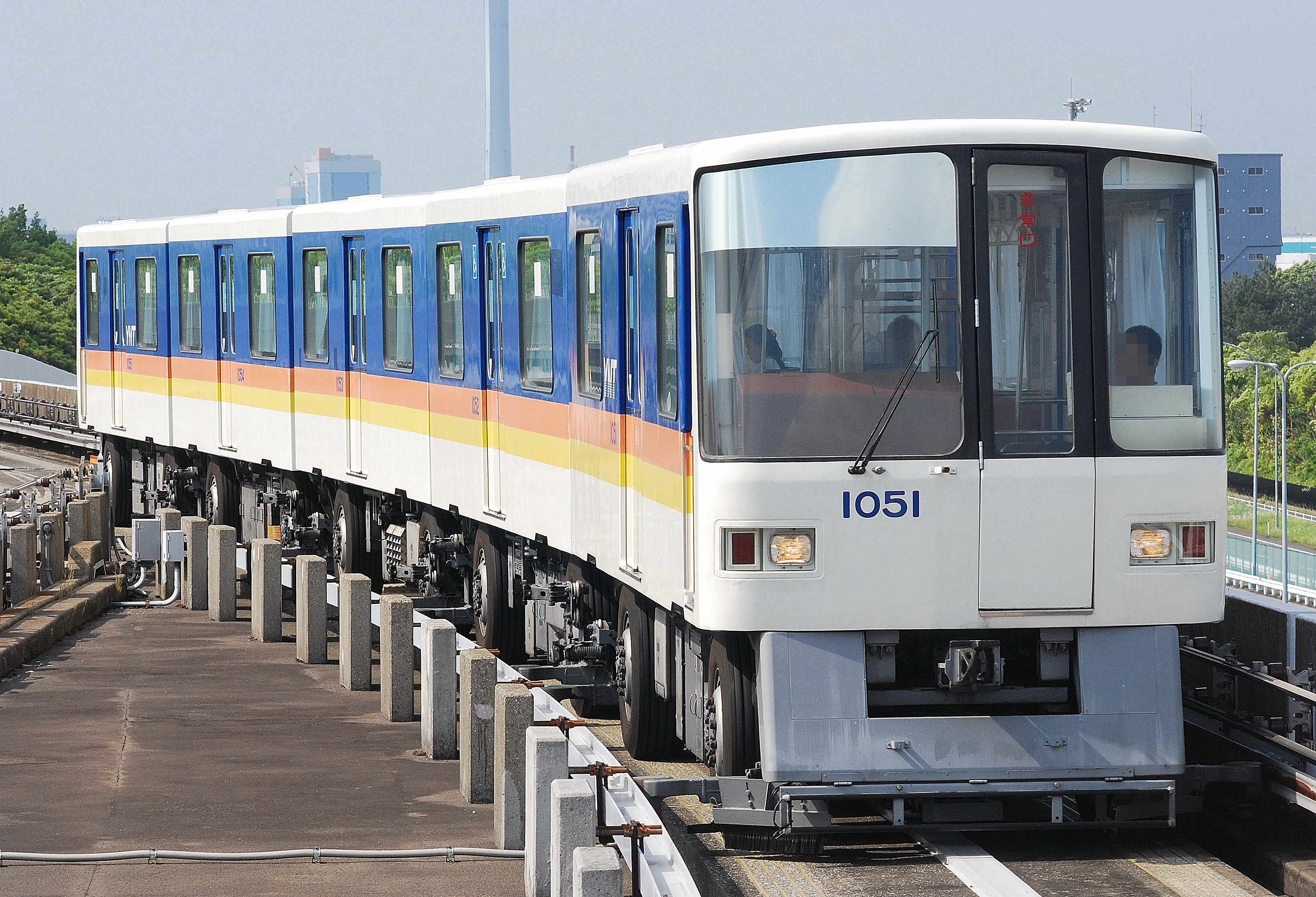 横浜新都市交通1000形（並木中央駅ホームから撮影）